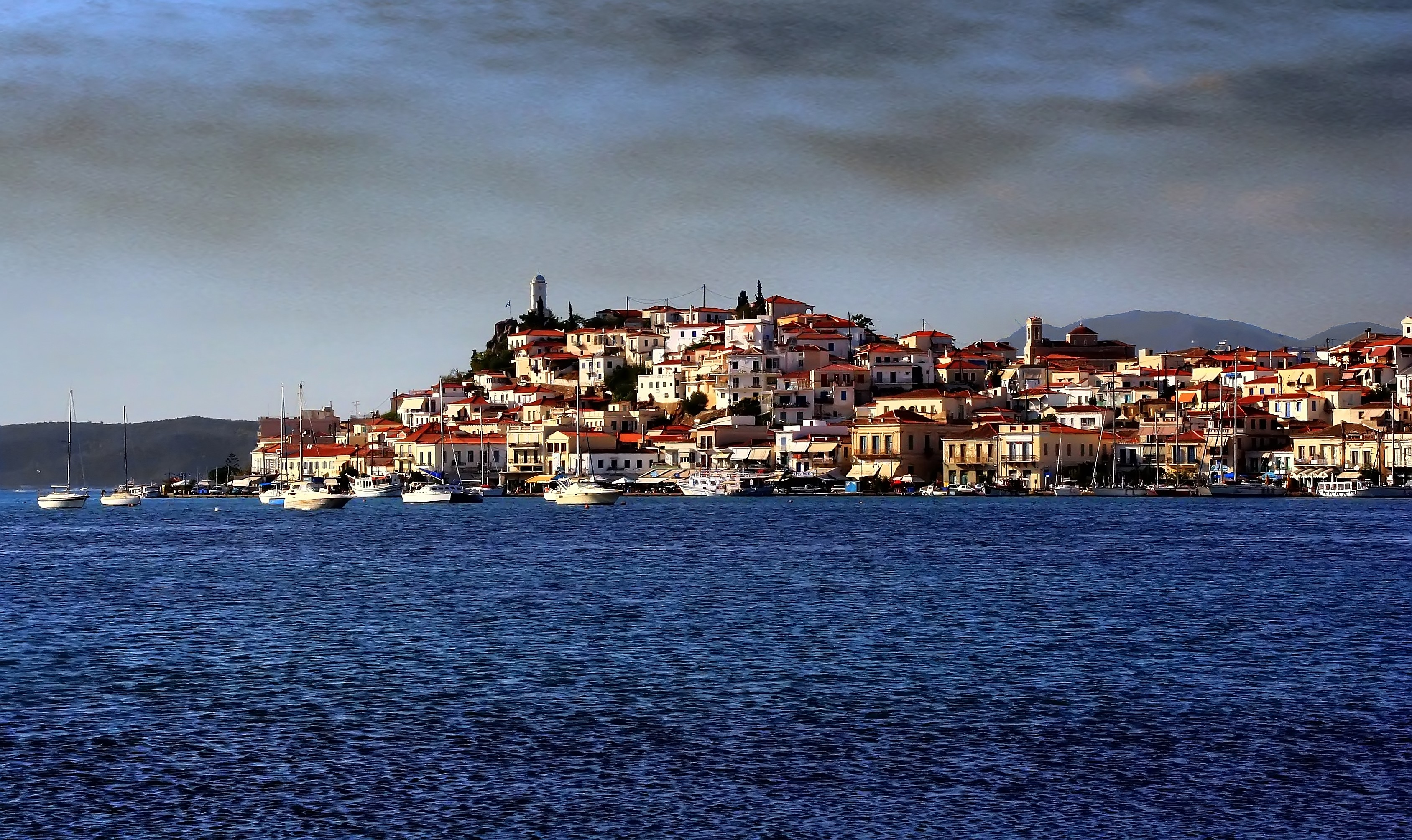 Poros - Greece